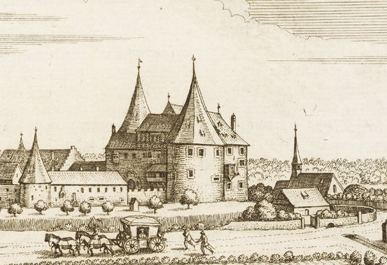 Die Burg Guémar, Ausschnitt aus dem Kupferstich von Matthäus Merian